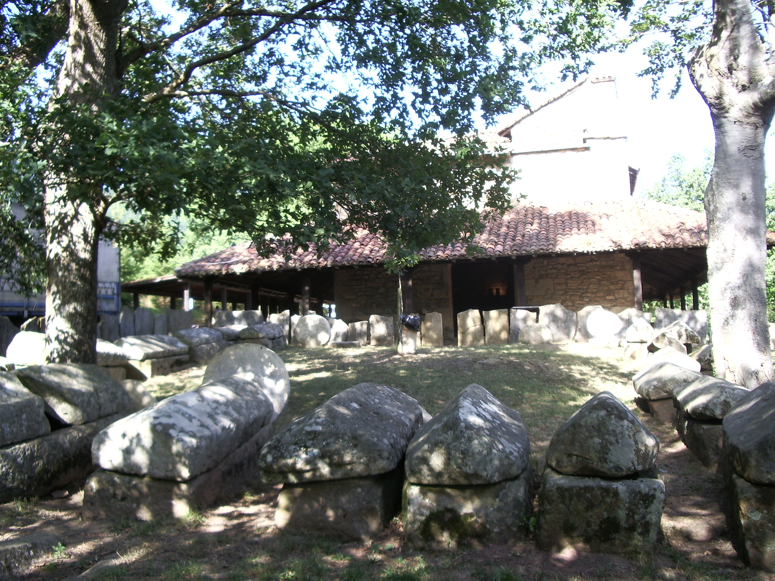 Necrópolis de Argiñeta. En Elorrio.